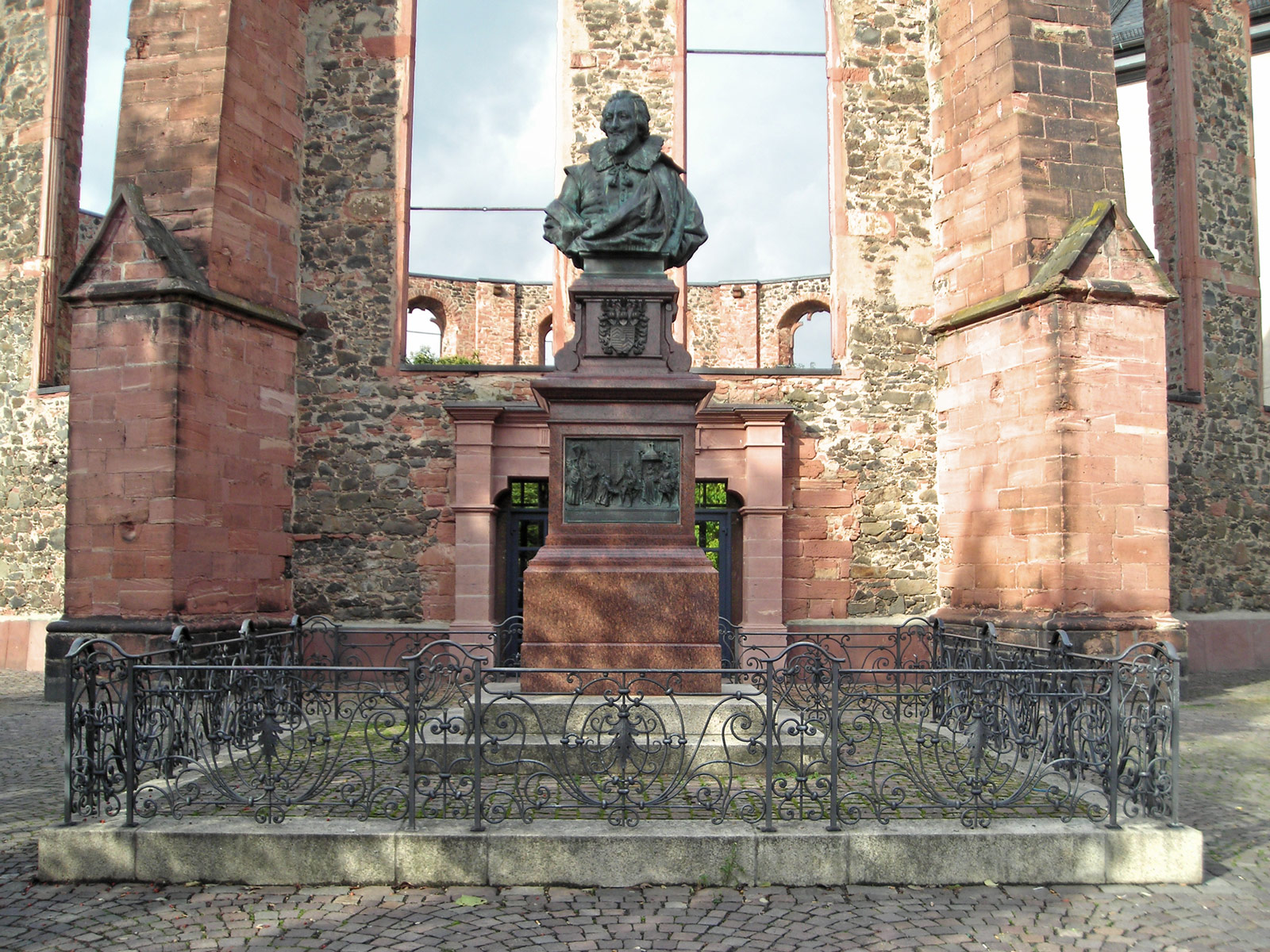 Büste Philipp Ludwigs des Zweiten, Graf von Hanau-Münzenberg, Gründer der Hanauer Neustadt. Errichtet bei der niederländisch-wallonischen Kirche im Jahre 1897 anlässlich der 300-Jahr-Feier der Gründung der Neustadt Hanau.